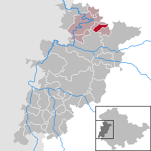 Bischofroda in Thuringia - Wartburgkreis